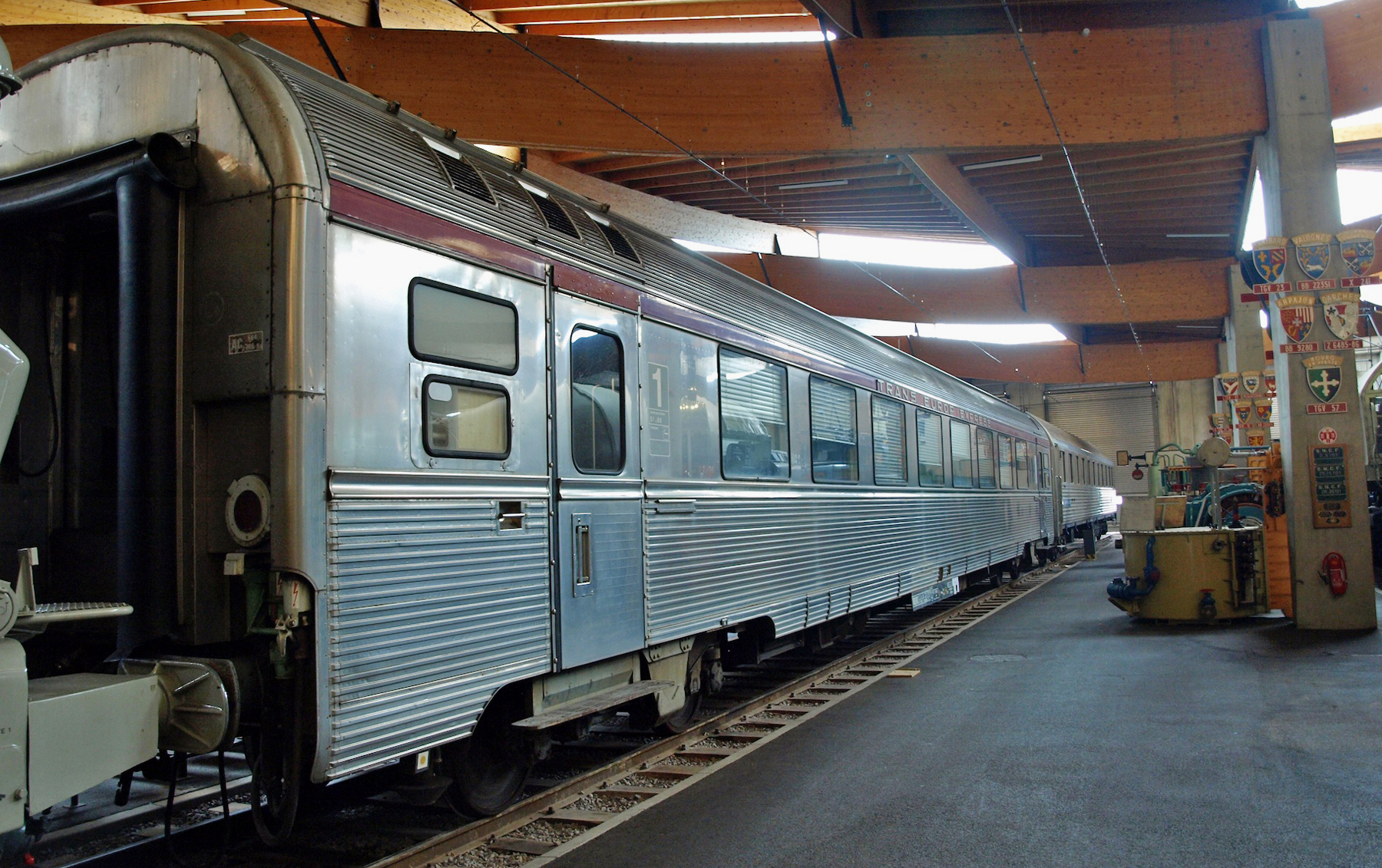 A8tu Inox Mistral 69